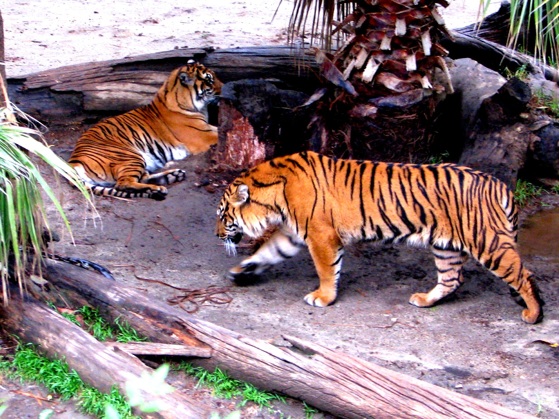 Sumatran Tigers